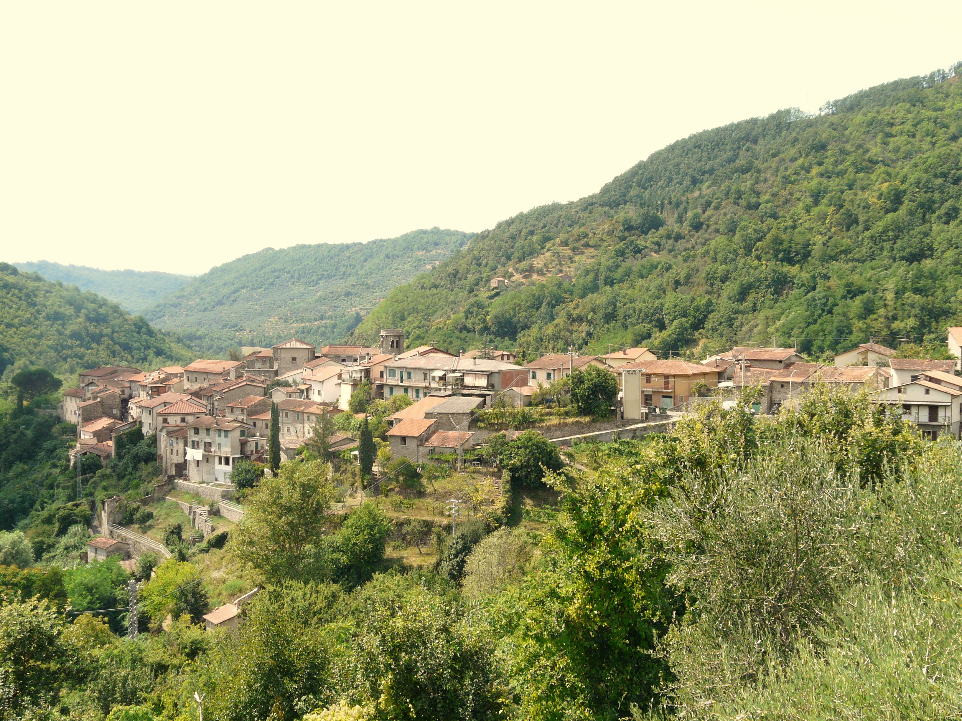 Panorama di Casola in Lunigiana, Toscana, Italia